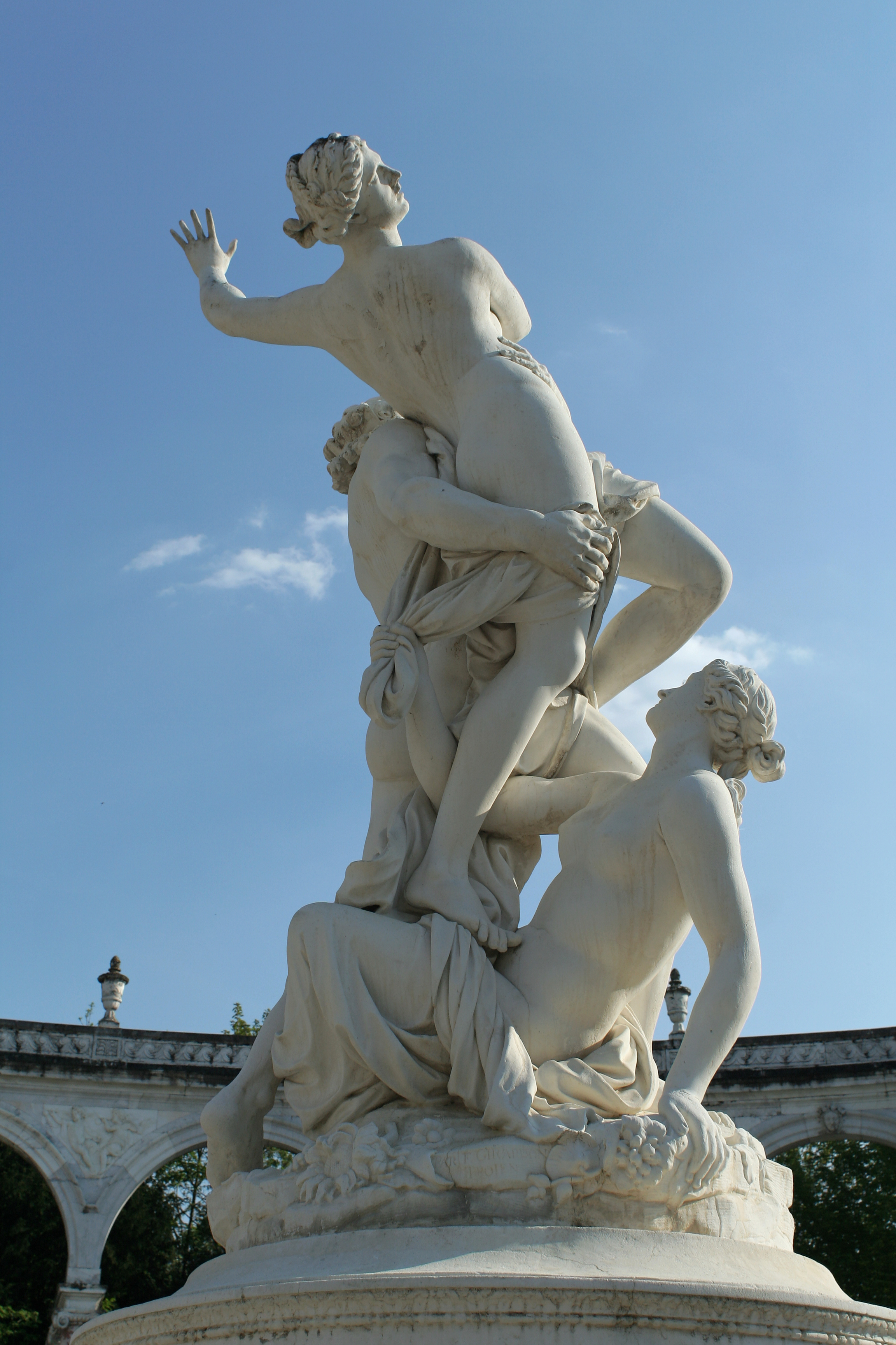 Parc de Versailles, bosquet de la Colonnade. Enlèvement de Proserpine par Pluton, moulage du groupe sculpté de François Girardon, 1677-1699.